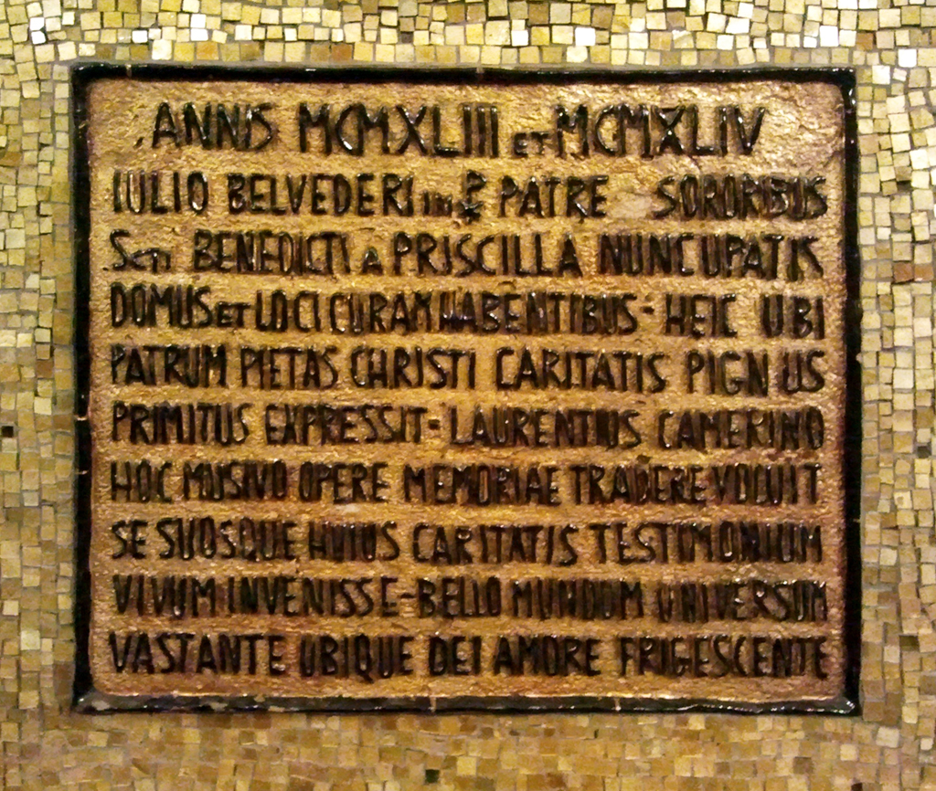 Iscrizione commemorativa del mosaico nella Cappella della Catacombe di Priscilla, ad opera di Vincenzo Camerino negli anni 1943-44.